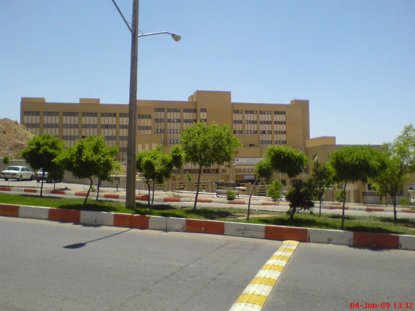 تبریز - بیمارستان عالی نسب